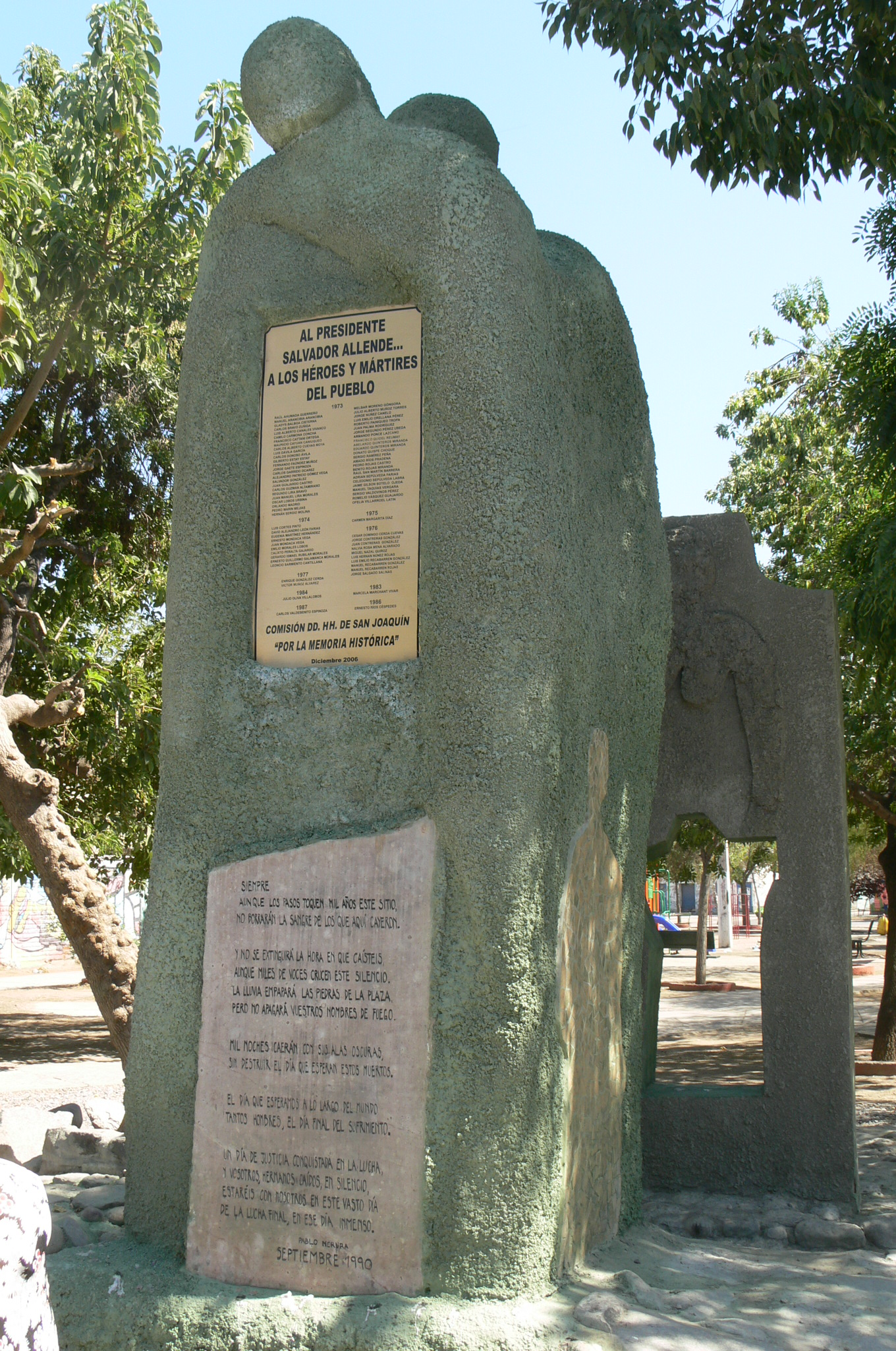 Memorial conmemorativo de la violación de los DDHH en Chile durante el régimen de Pinochet